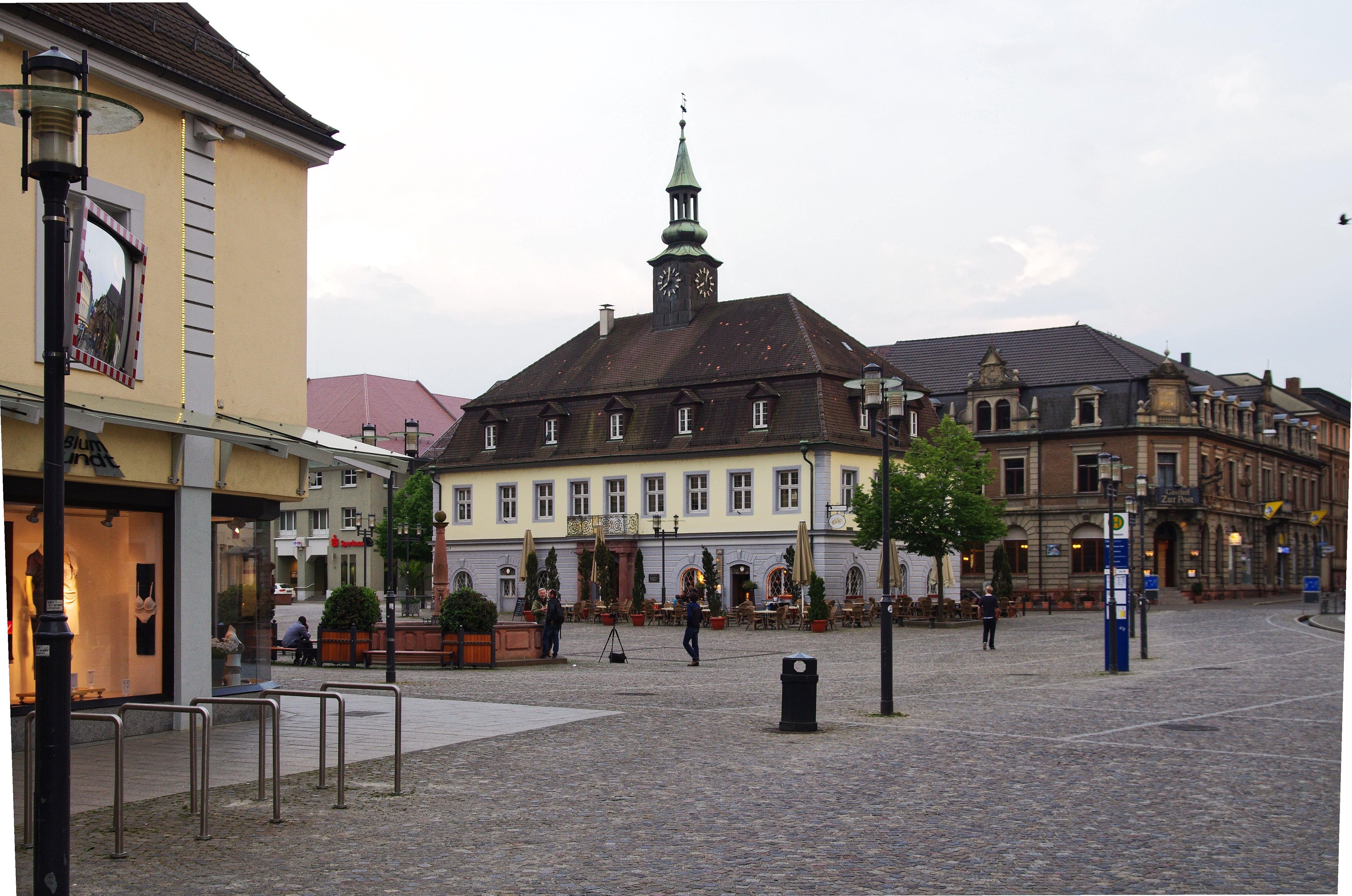 Marktplatz mit dem Alten Rathaus in Emmendingen